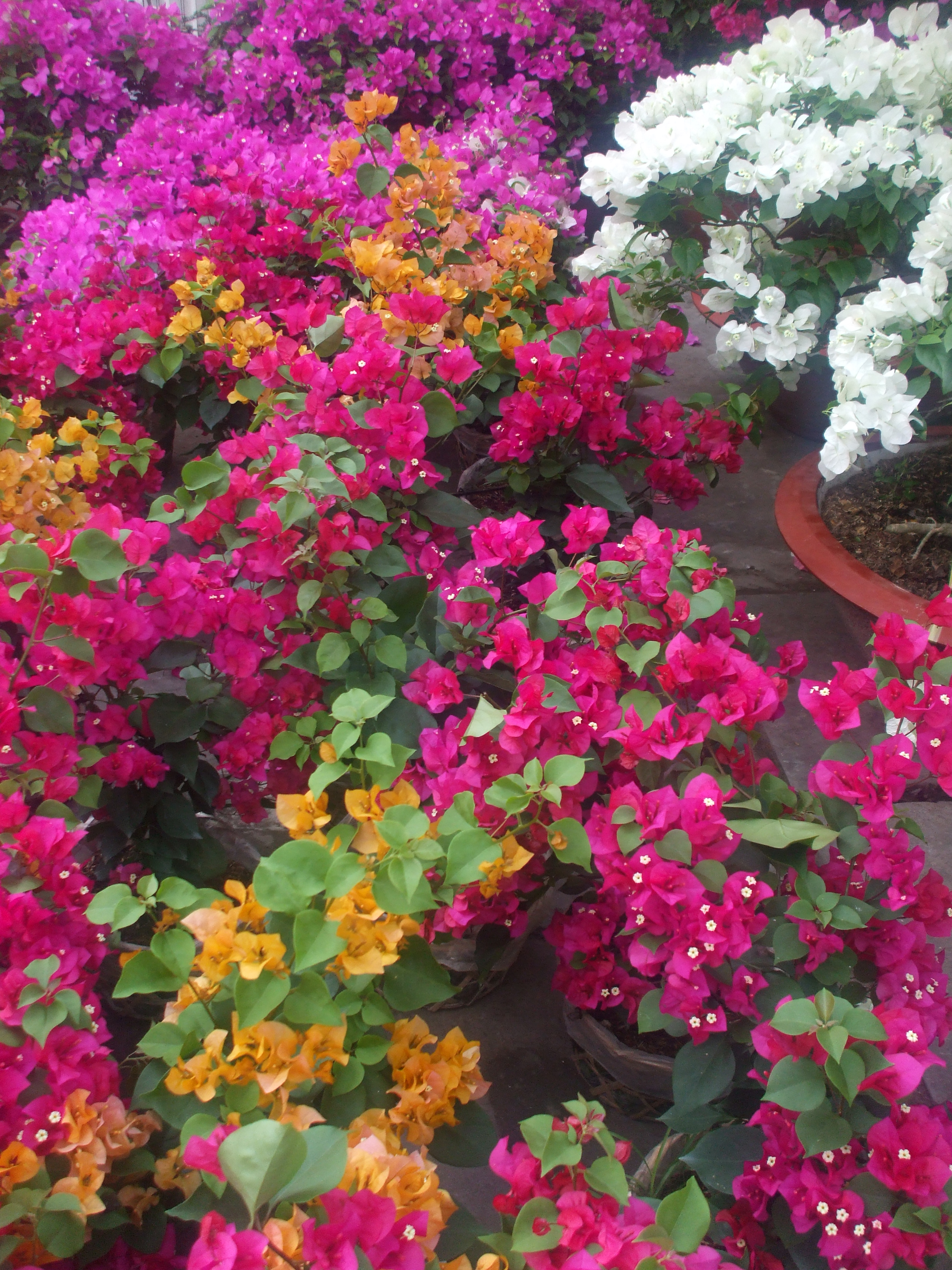 Bốn màu hoa giấy đang khoe sắc tại chợ hoa Long Xuyên (An Giang, Việt Nam) năm 2007.